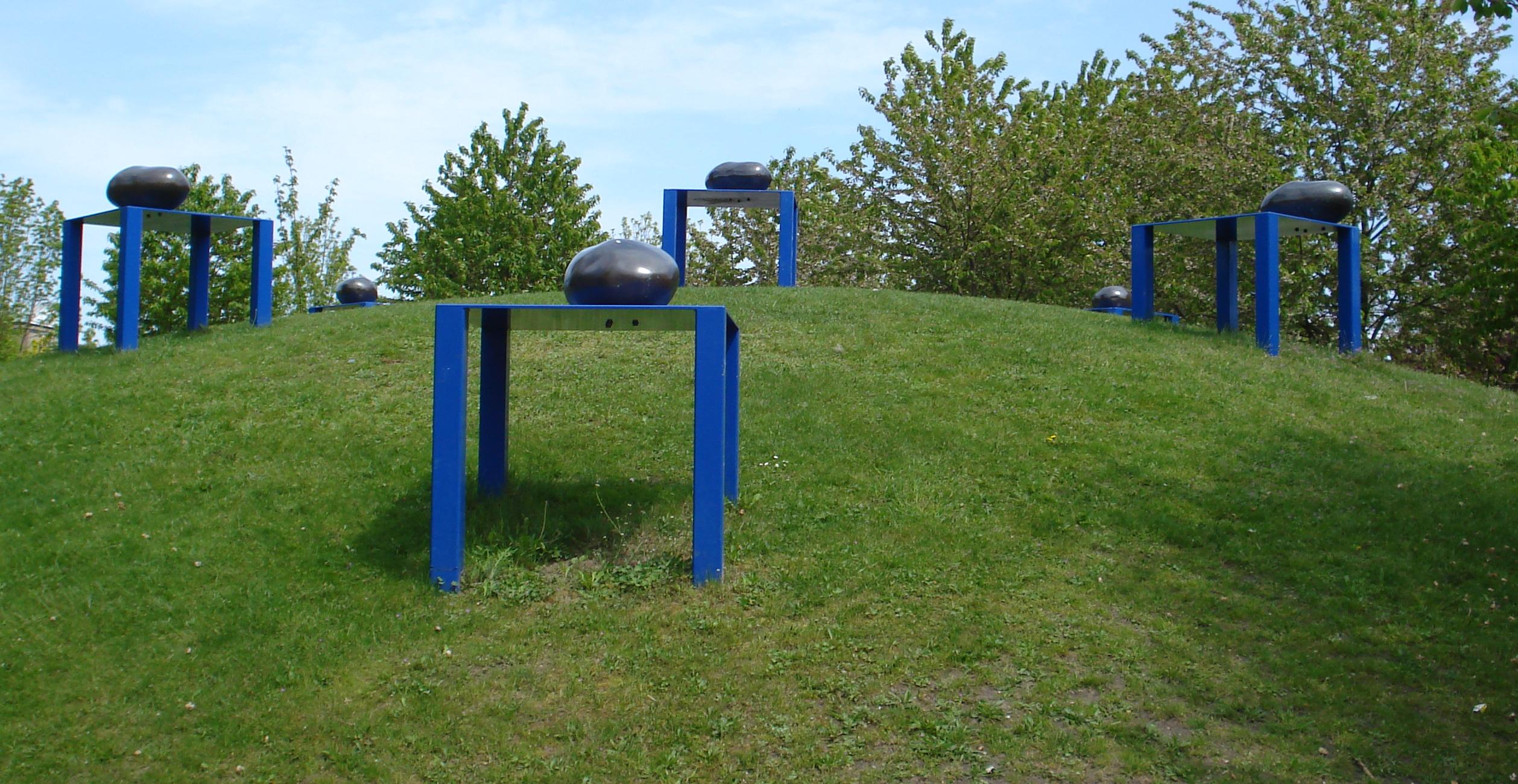 Amersfoort, Mysterie, hoek Avontuur. Kunstwerk "Etenstijd" van Gust Romijn. Amersfoort/The Netherlands.